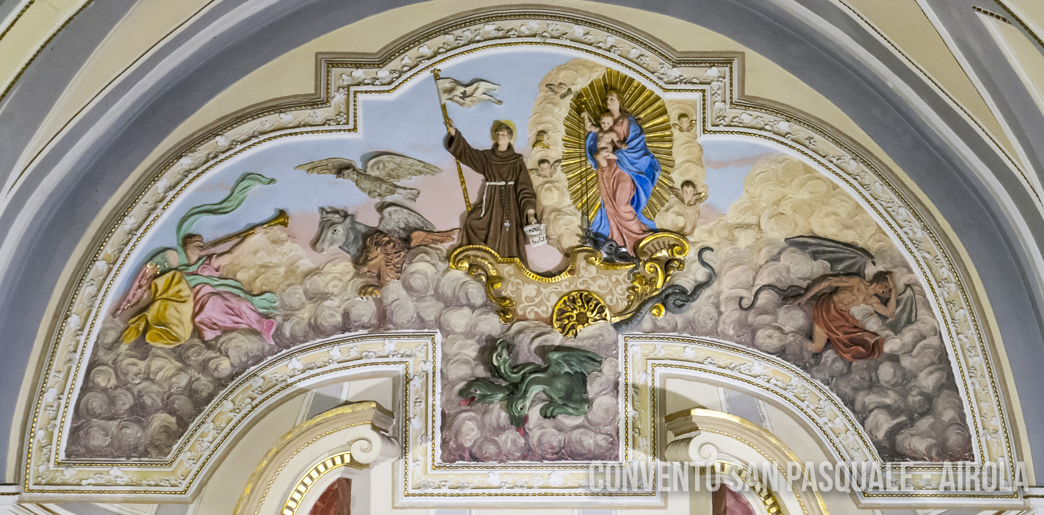 Bassorilievo raffigurante il Dogma dell'Immacolata Concezione con Giovanni Duns Scoto